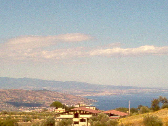 Golfo di Squillace da Davoli